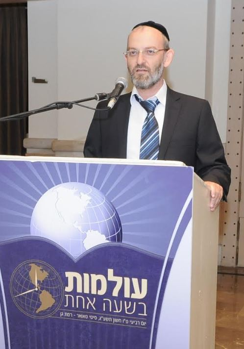 הרב יעקב זילברליכט